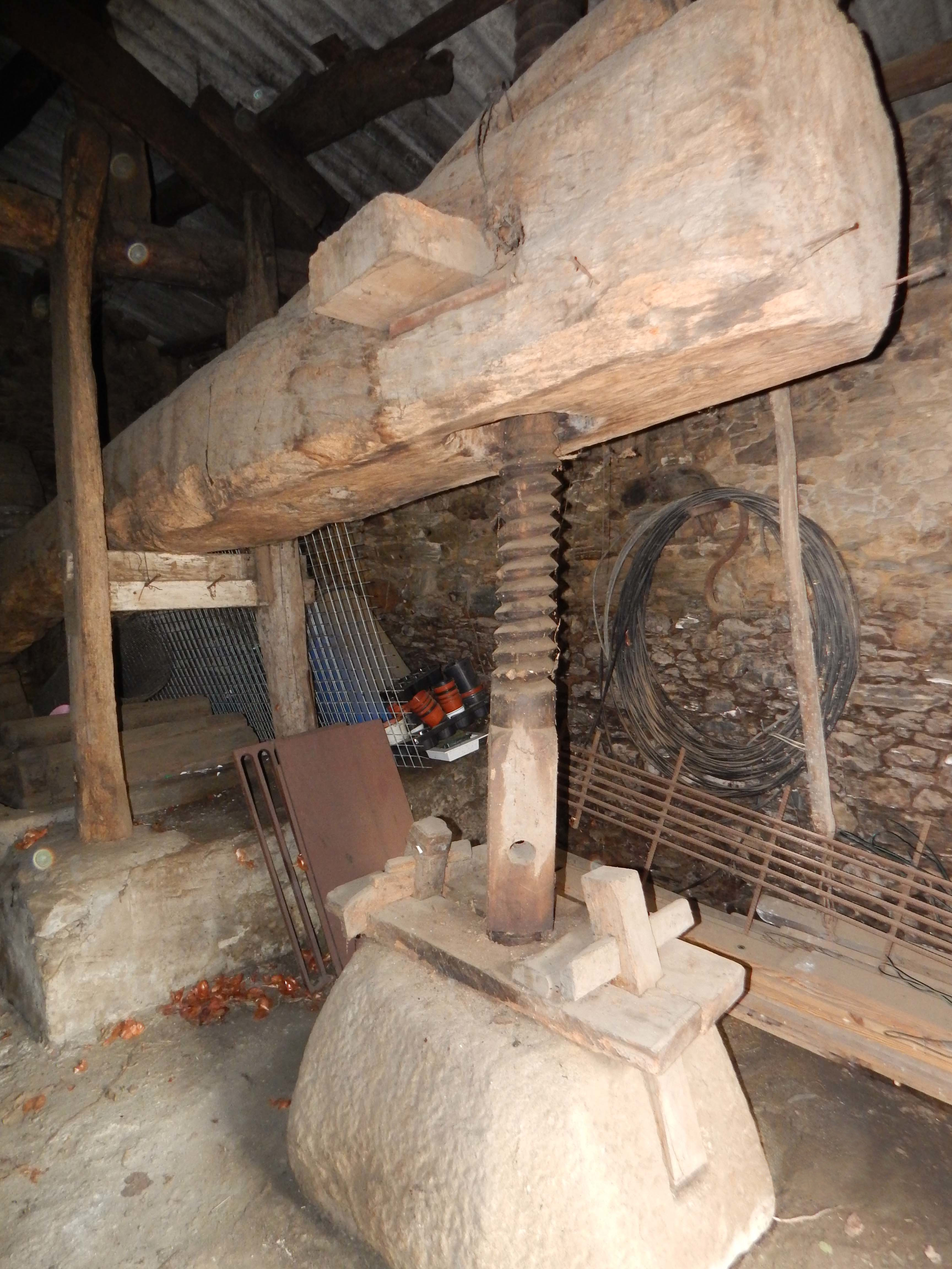 Lagar da Casa de Proia, Padrín, Bemantes, Miño 2018